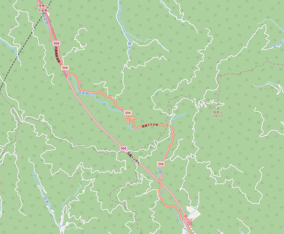 北薩横断道路の北薩トンネルの周辺地図。 This map may be incomplete, and may contain errors. Don't rely solely on it for navigation.